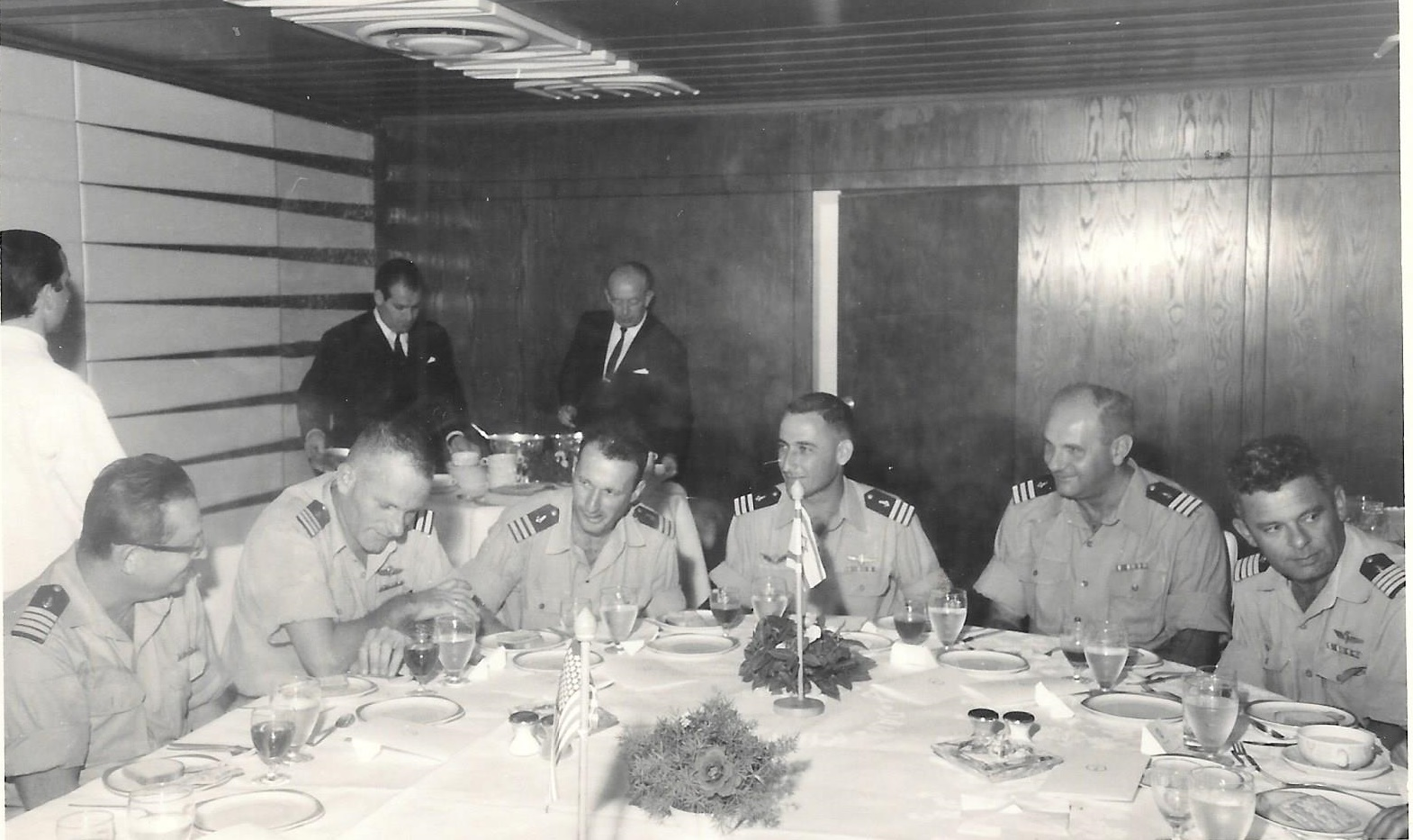 מפקדי שייטת המשחתות בפיקוד מנחם כהן